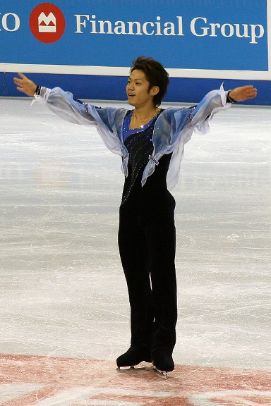 Daisuke Takahashi at the 2006 Skate Canada International.